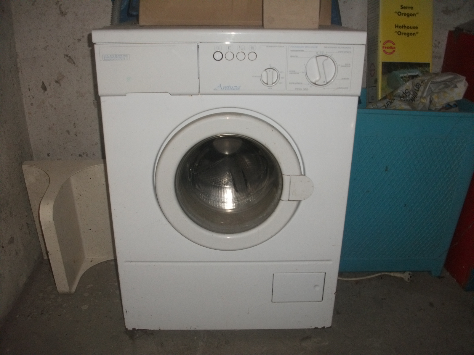 Pralka Polar PDG 385 "Aretuza" z 1996 roku.Istniały dwie wersje koloru włącznika: pomarańczowy i niebieski.Ta wersja ma niebieski włącznik